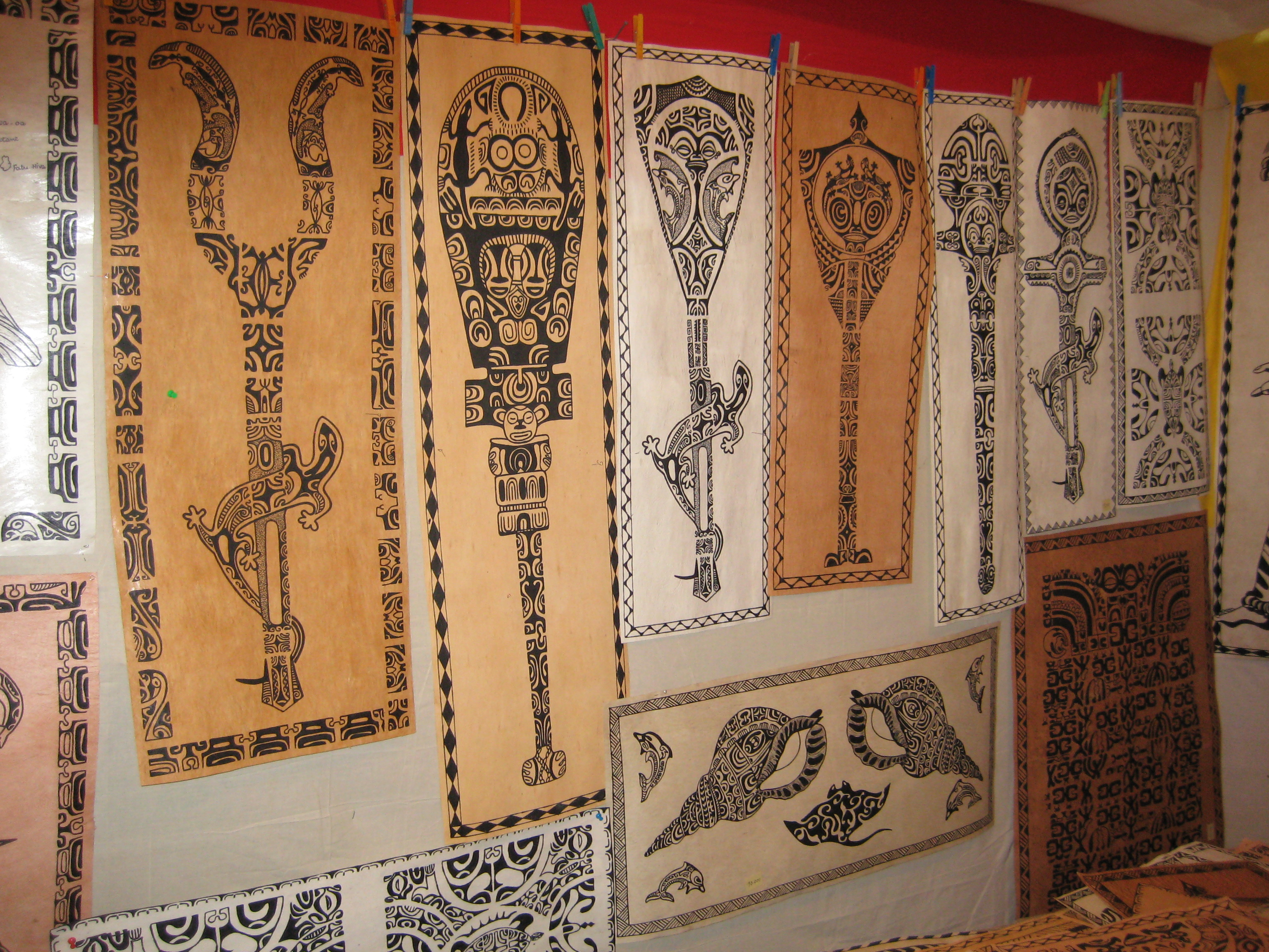 Tapas aux motifs marquisiens